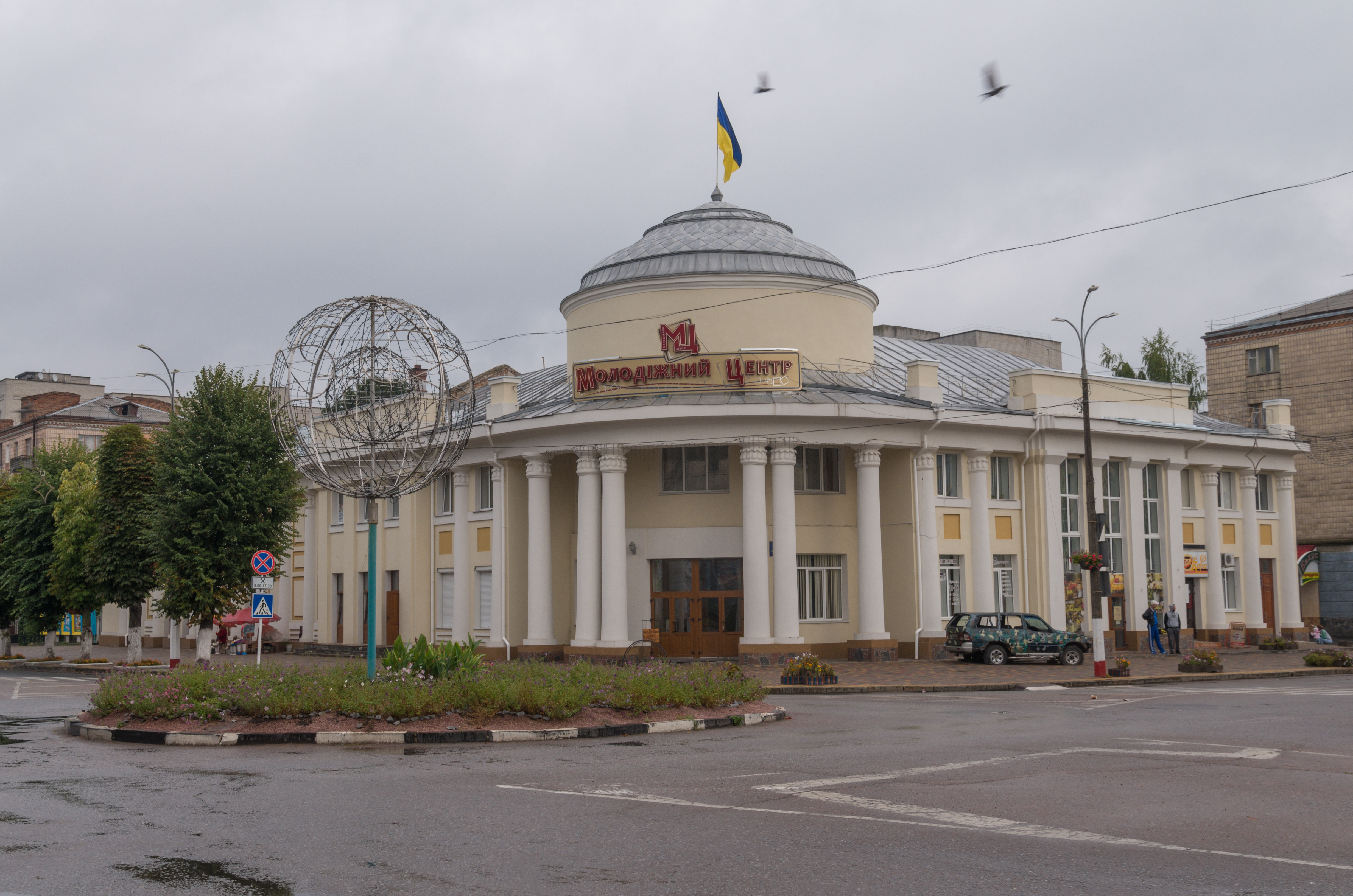 Кінотеатр ім. Щорса, Новоград-Волинський, вул. Шевченка, 5